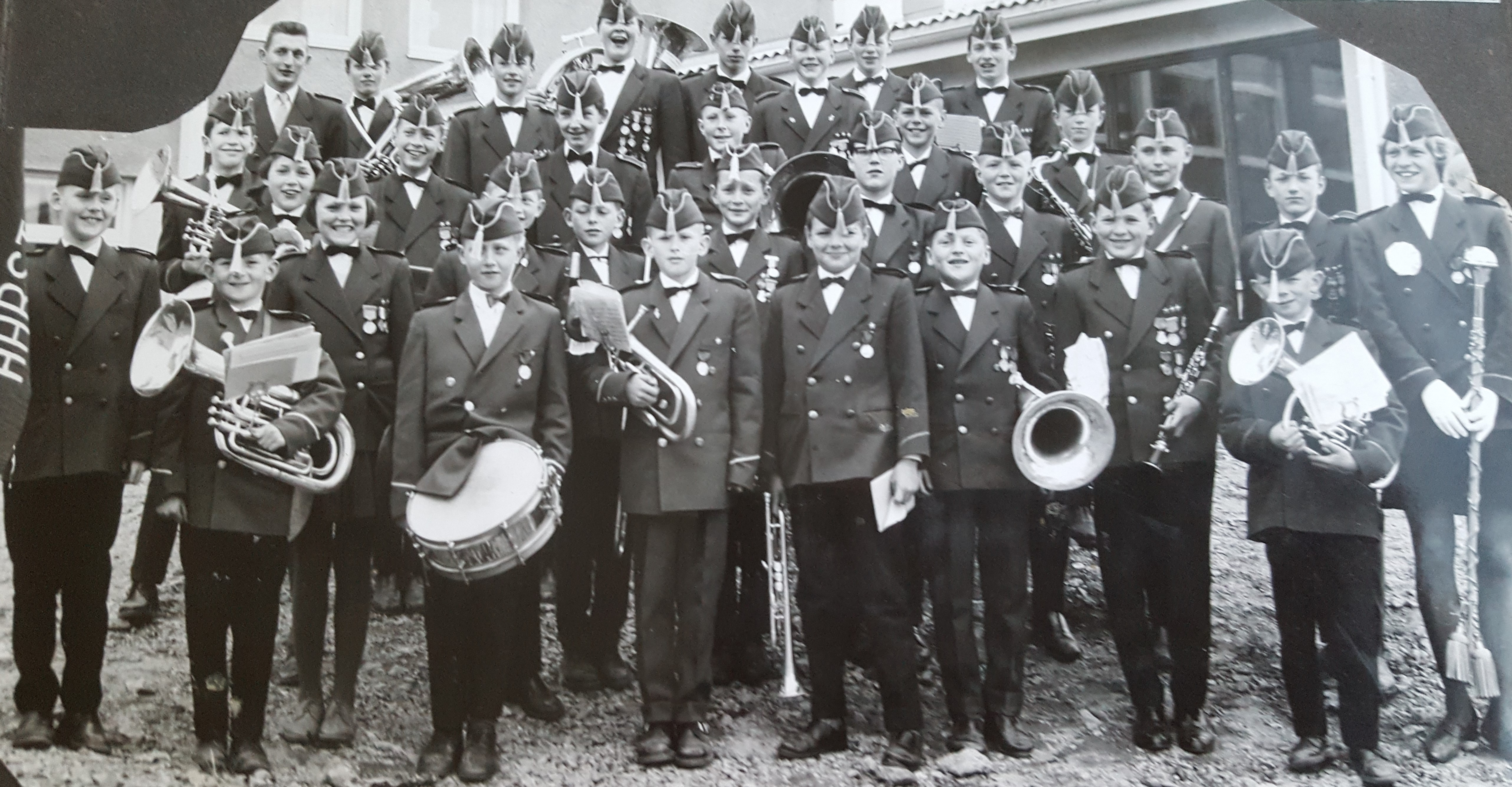 Harstad Folkeskoles Musikkorps på musikkstevne på Seljestad i 1962.